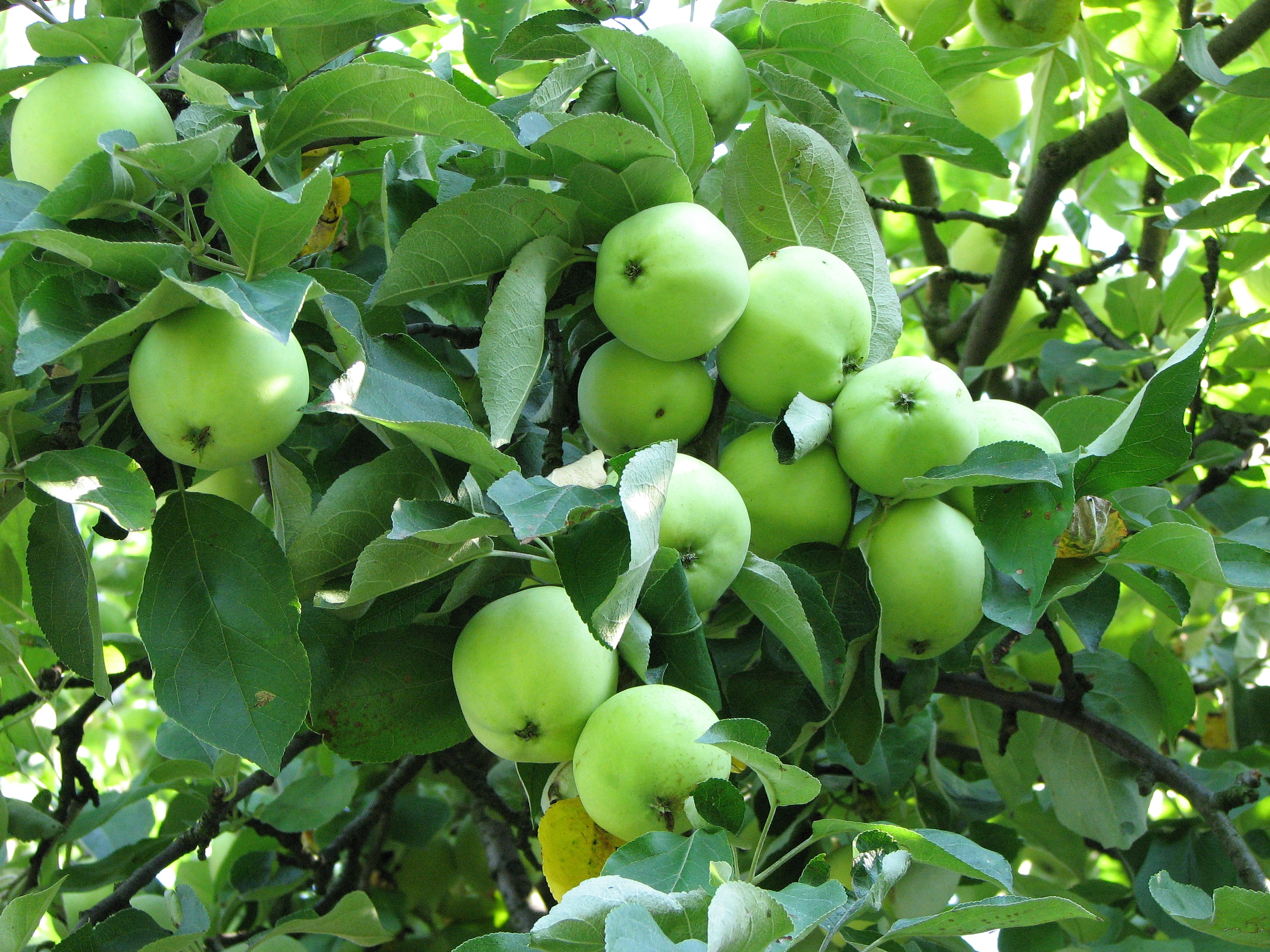 Papierówki